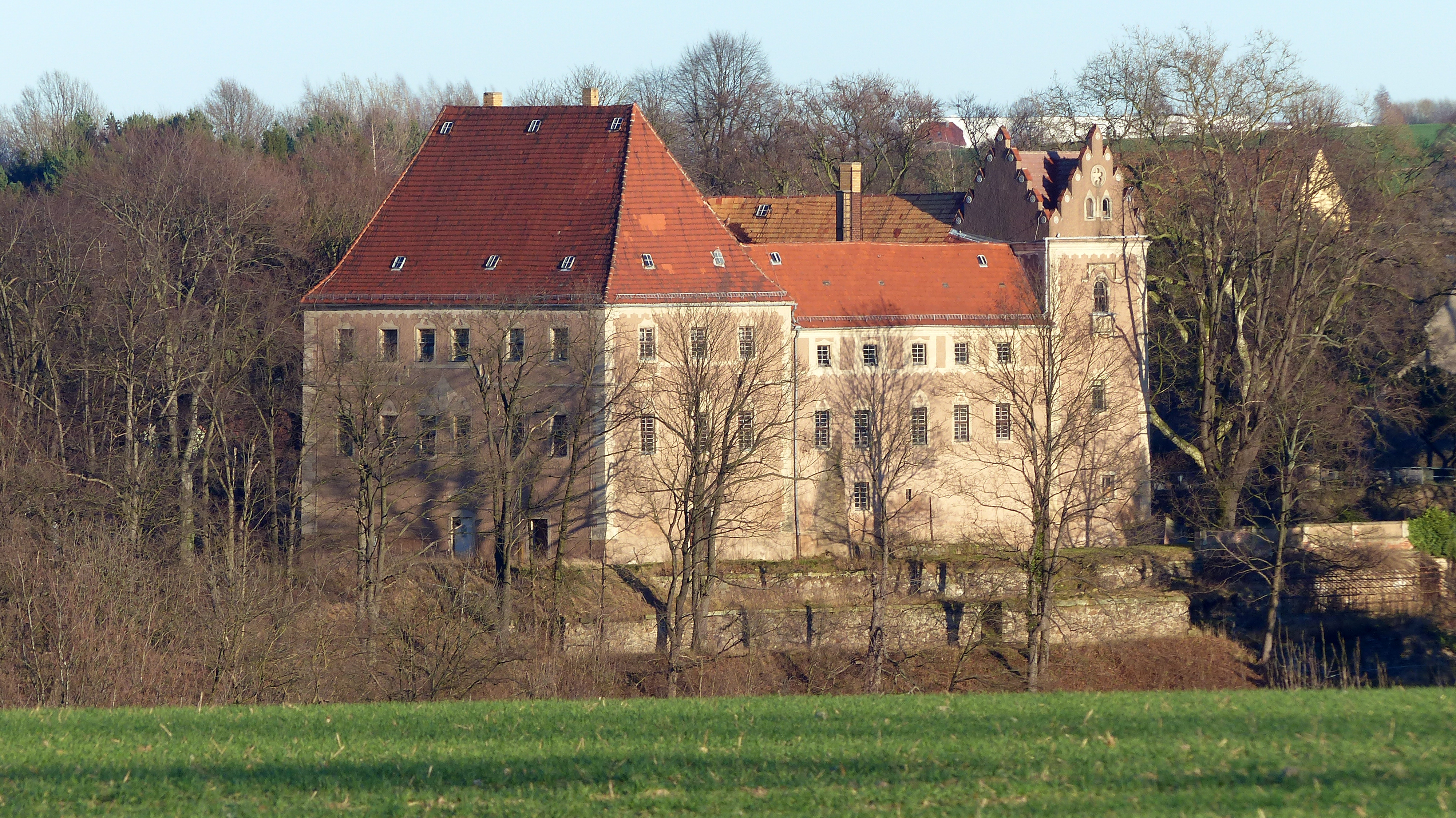 Schloss Taubenheim, Gemeinde Klipphausen